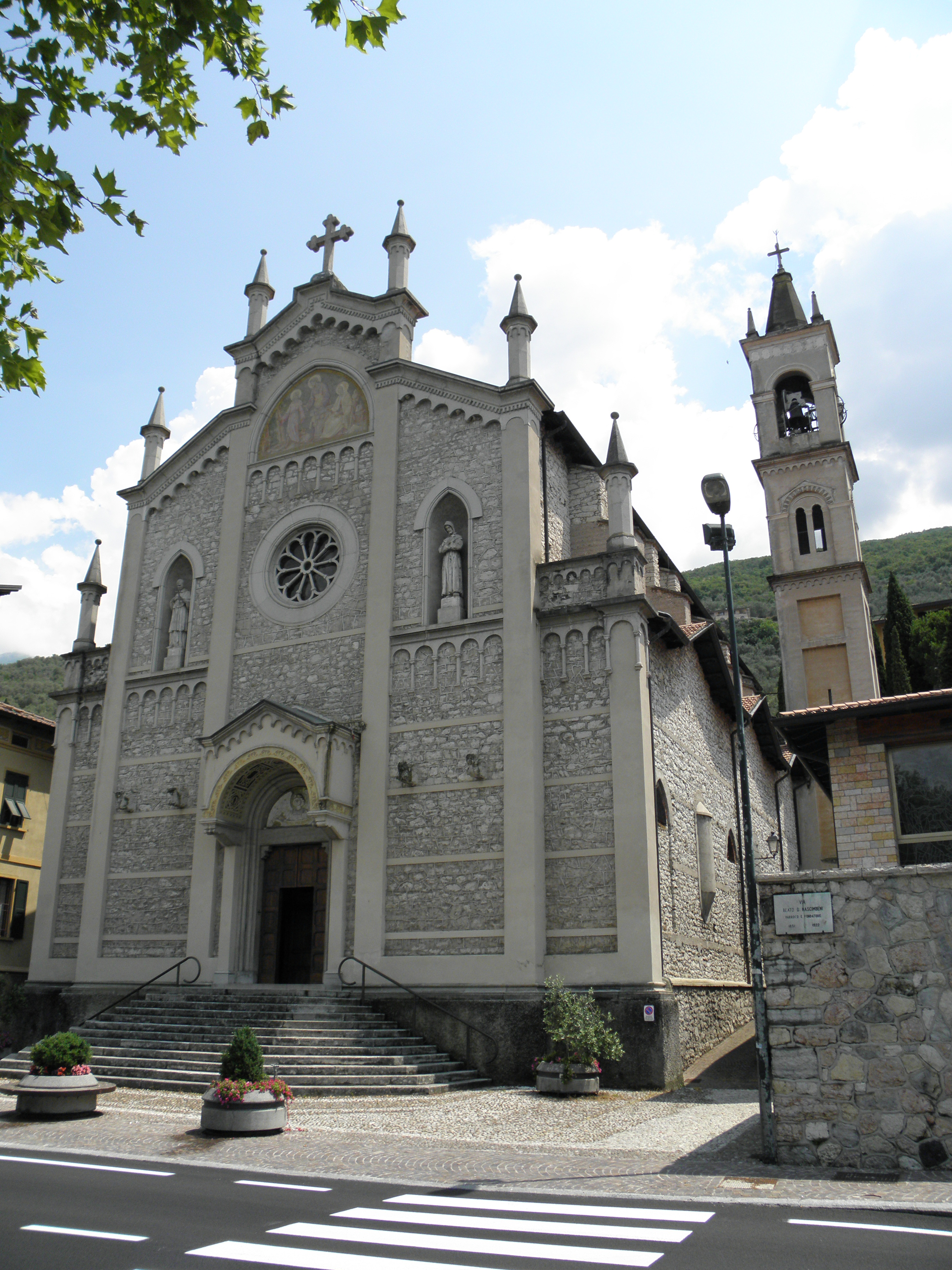 Castelletto di Brenzone, la chiesta parrocchiale di San Carlo Borromeo.